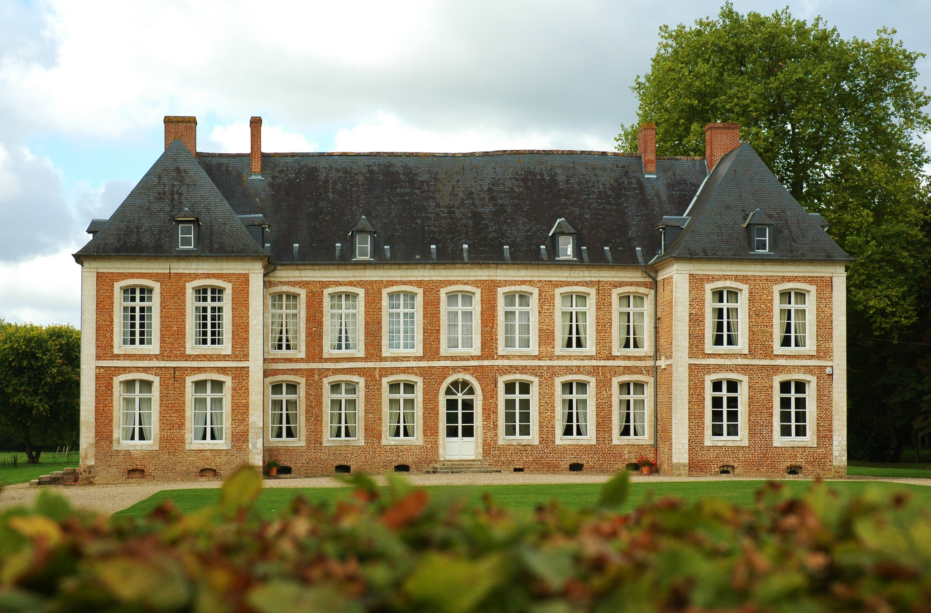 Le château de Willeman, Pas-de-Calais, France